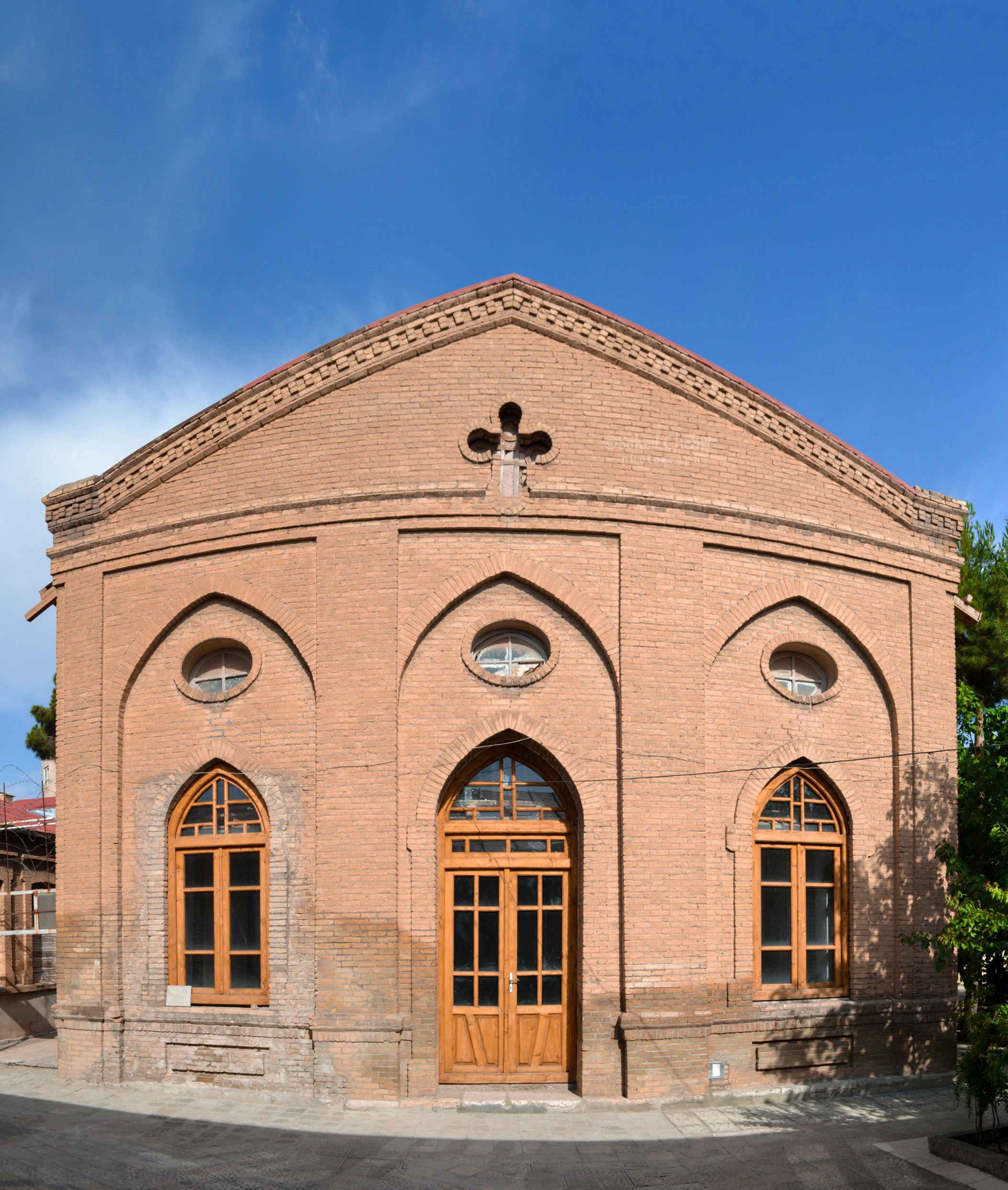 کلیسا قلب مقدس مسیح کرمانشاه عکاس : سهیل چهری